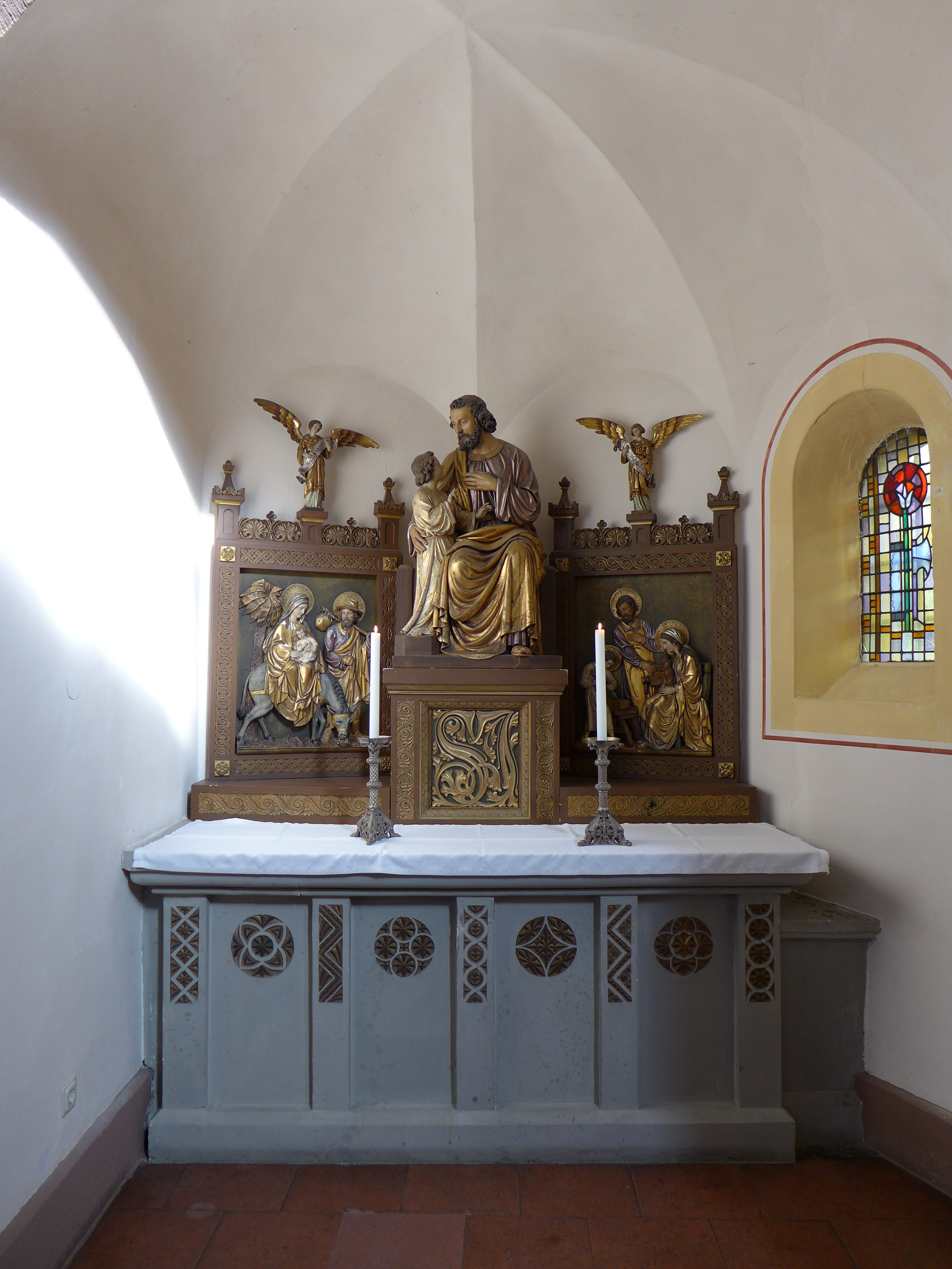 Saardom, Josefskapelle